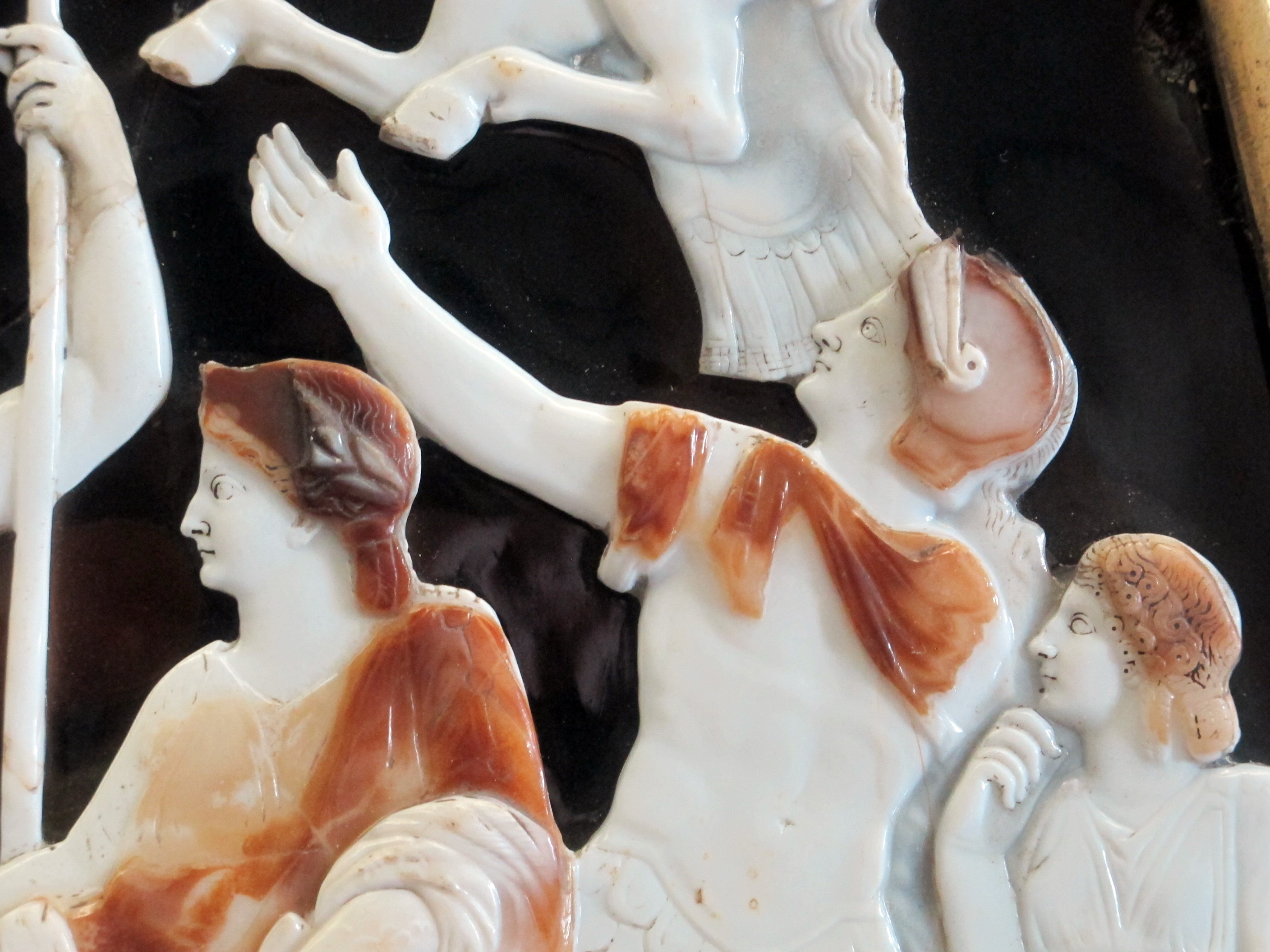 Arte romana, gran cammeo della ste chapelle con esaltazione della dinastia giulio-claudia, 23 dc ca., livia maggiore, druso cesare e agrippina